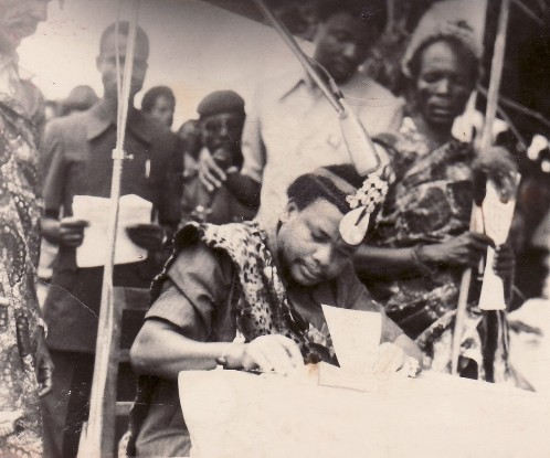 Mwami Lenghe au travail devant le grand public